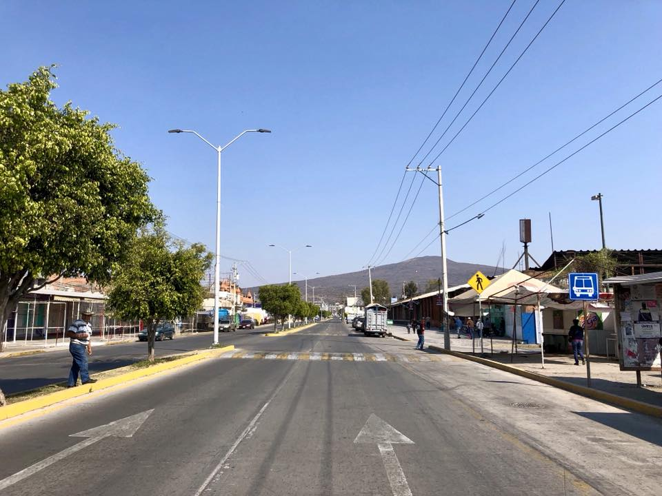 Bulevar Leovino Zavala Uriangato